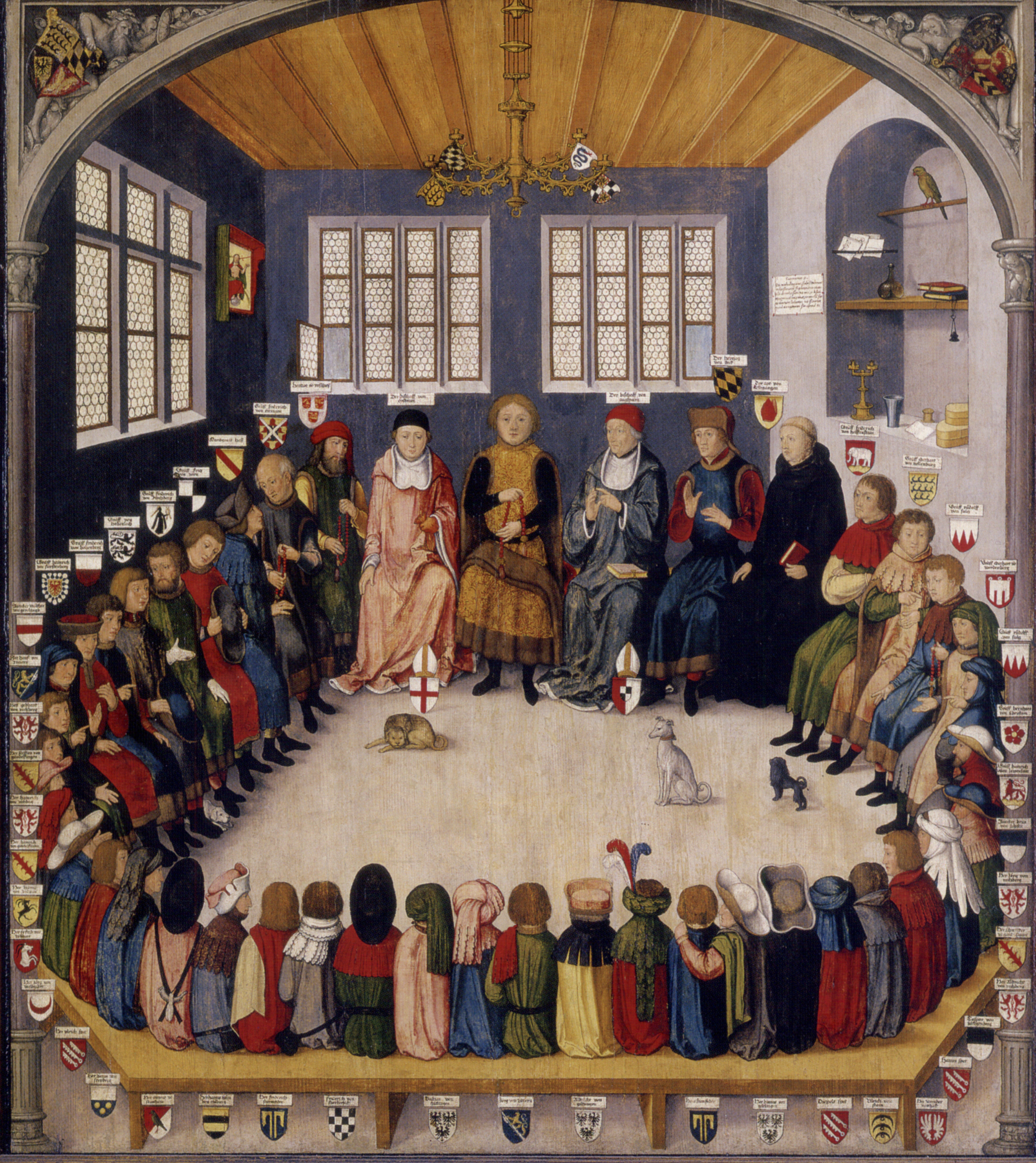 Ratssitzung des Grafen Eberhard des Milden (1392-1417). Ölbild auf Holz. Kopie um 1540 nach einem Vorbild um 1440. Württembergisches Landesmuseum, Stuttgart; Inv. Nr. 2735